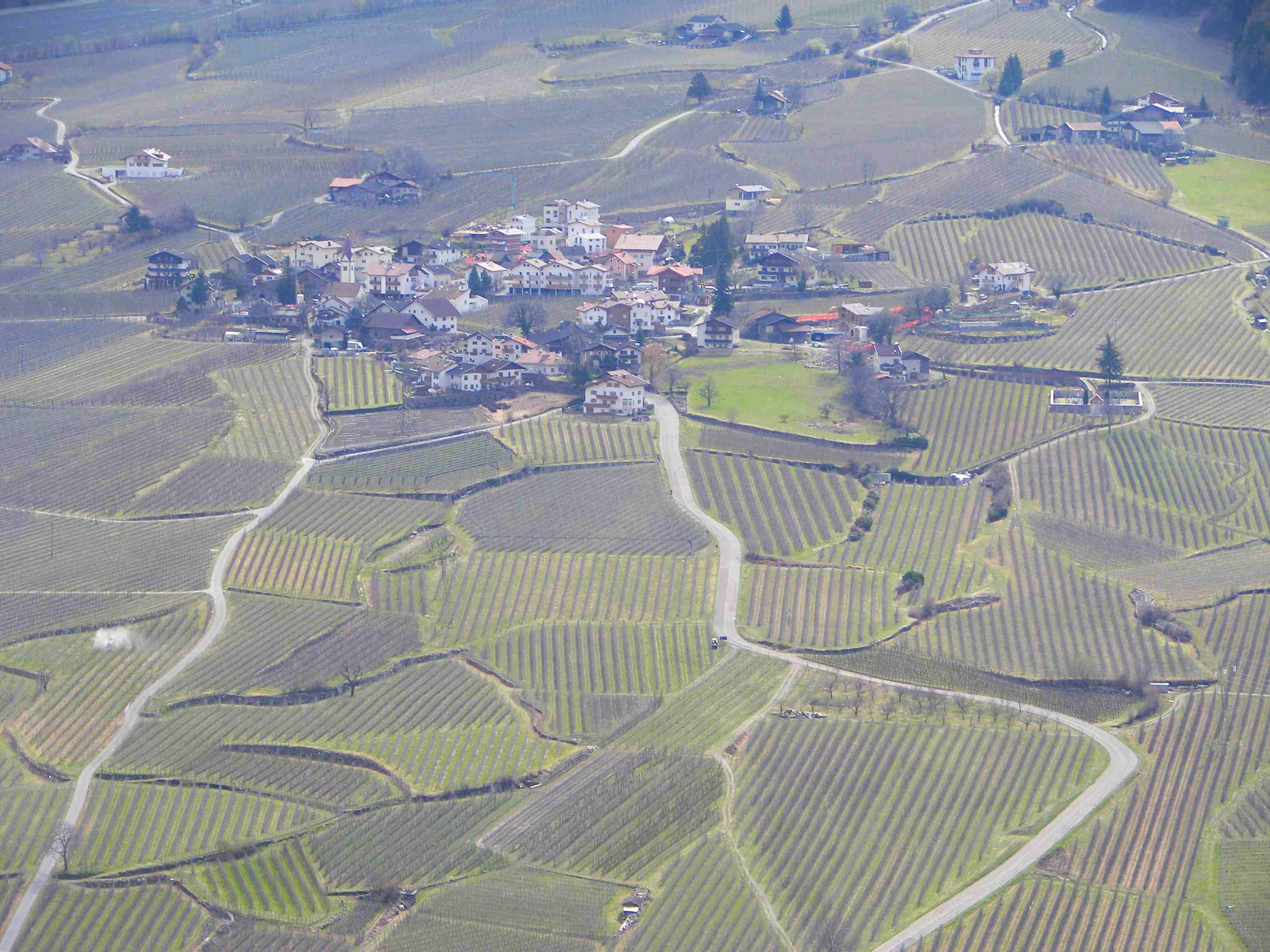 Tabland, ital. Tabla, ein Ortsteil von Naturns in Südtirol